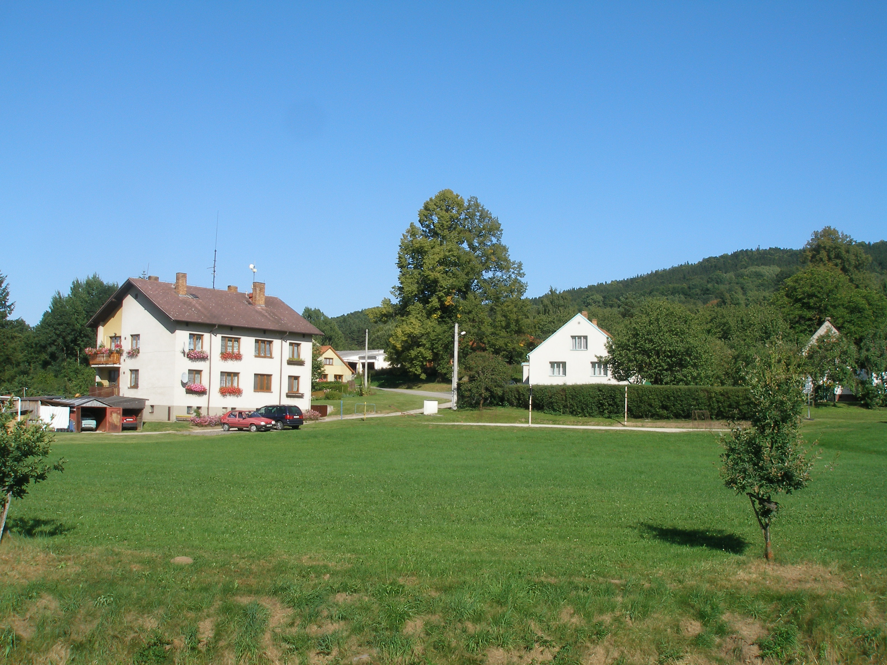 Jáma - stavení na návsi osady